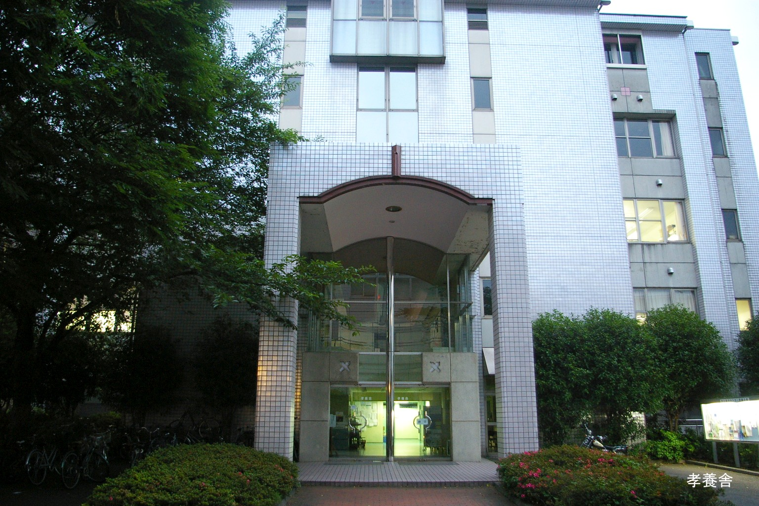 東京都で撮影